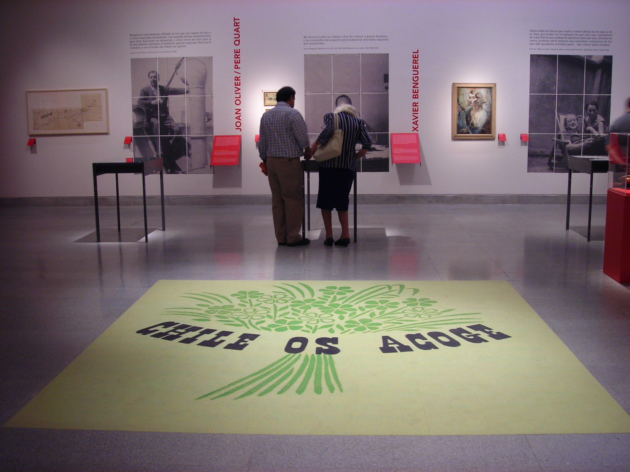 Exposición «Literaturas del Exilio», en el Centro Cultural Palacio de la Moneda, Santiago de Chile (junio-julio de 2007). Con el fin de la guerra civil española llegaron a Chile miles de españoles perseguidos por la dictadura de Franco y desterrados de su país. Muchos de ellos vinieron en el Winnipeg que desembarcó en Valparaíso en el año 1939. Ahora, varias décadas después, se exhibe una muestra con documentos, objetos, fotografías, pinturas, libros, etc. que está dedicada al exilio español republicano. Ojalá el rescate de esta memoria sirviera para que reflexionáramos sobre cómo hoy en día acogemos a otros pueblos, tal vez nos daría vergüenza enfrentar el hecho de que somos discriminadores y cerrados con peruanos, bolivianos, argentinos y tantos otros. Chile fue, en algún momento de su historia, un país solidario.